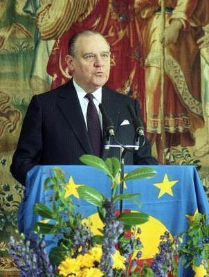 Title: Bonn, Verleihung Coudenhove-Kalergi-Preis an Kohl Extra information: Rede Raymond Barre People in the image: Barre, Raymond: Premierminister, Wirtschafts- und Finanzminister, Frankreich (GND 118652656) Factual corrections and alternative descriptions are encouraged separately from the original description. Additionally errors can be reported at this page to inform the Bundesarchiv. Original historic description: Bonn, 29.4.1991 Für überragende Leistungen in der Europapolitik, für die erfolgreiche deutsche Wiedervereinigung und als Motor der gesamteuropäischen Einigung wurde Bundeskanzler Dr. Helmut Kohl während einer Feierstunde im Palais Schaumburg mit dem Coudenhove-Kalergi-Preis ausgezeichnet. Der Präsident der Paneuropa-Union, Europaabgeordneter Otto von Habsburg und der Präsident der Coudenhove-Kalergi-Stiftung, Gerard Bauer, überreichten dem Bundeskanzler in Anwesenheit des ehemaligen französischen Premierminister, Raymond Barre, den Coudenhove-Kalergi-Preis.